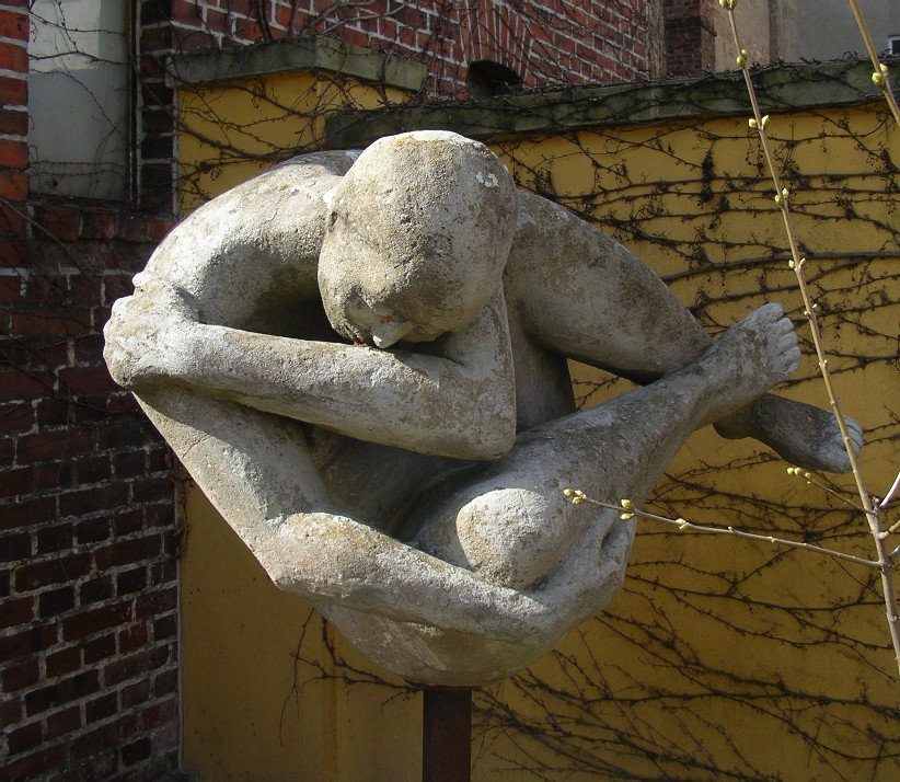 Skulptur "Bewahrende (Sich schützende Frau)" von Robert Riehl (1924-1976) Beton, 1968/74 Garten des Städtischen Museums Eisenhüttenstadt